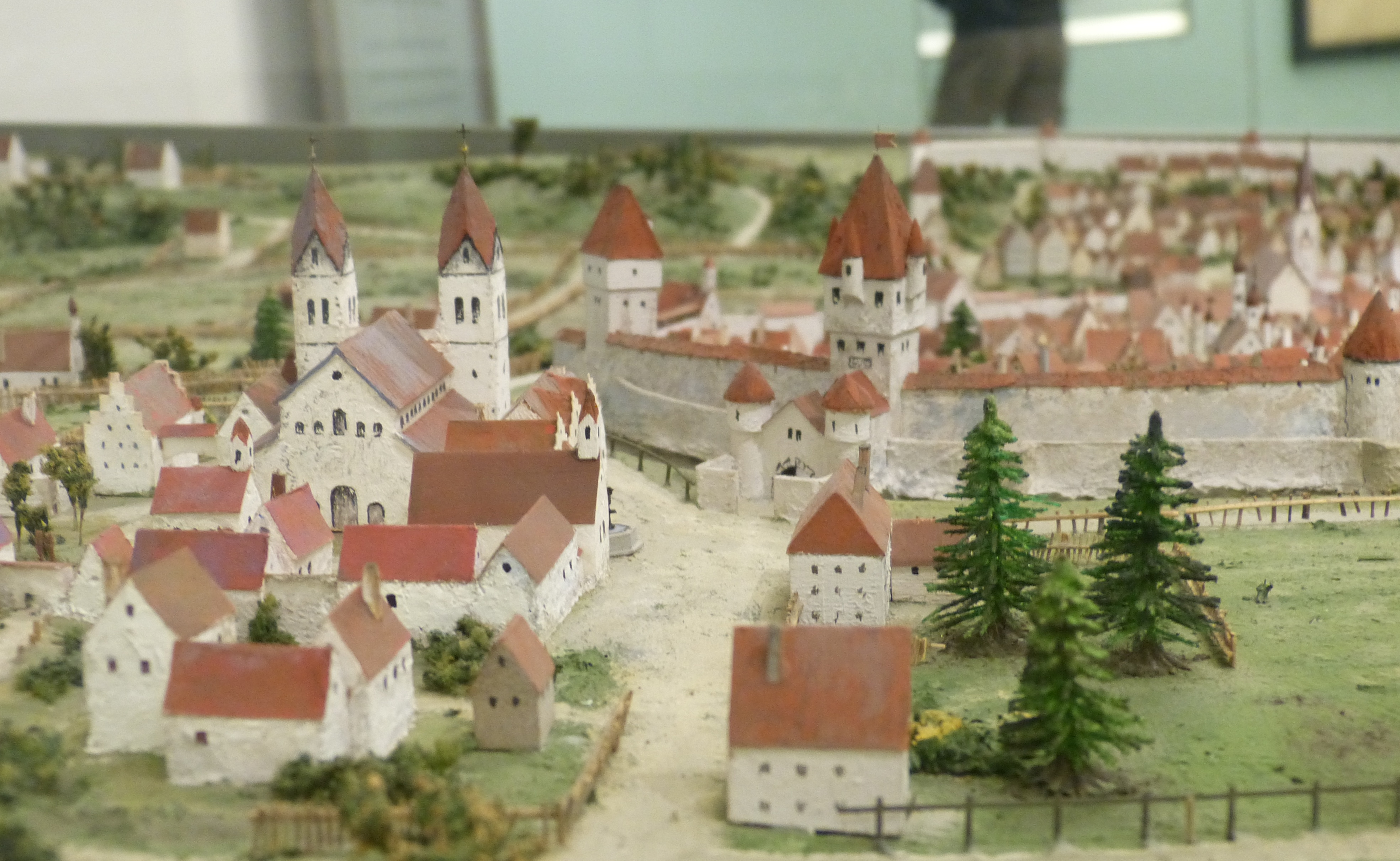 Stadtmodell von Kempten im AllgäuMuseum